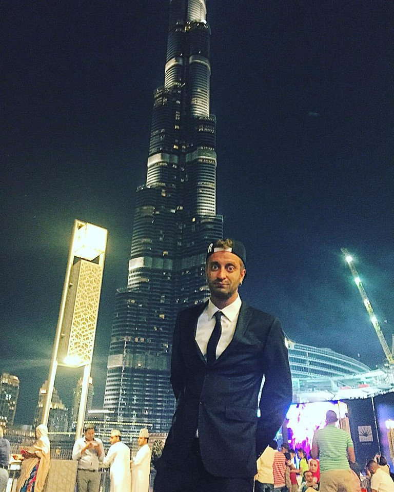 Stefano Corti durante un servizio de Le Iene